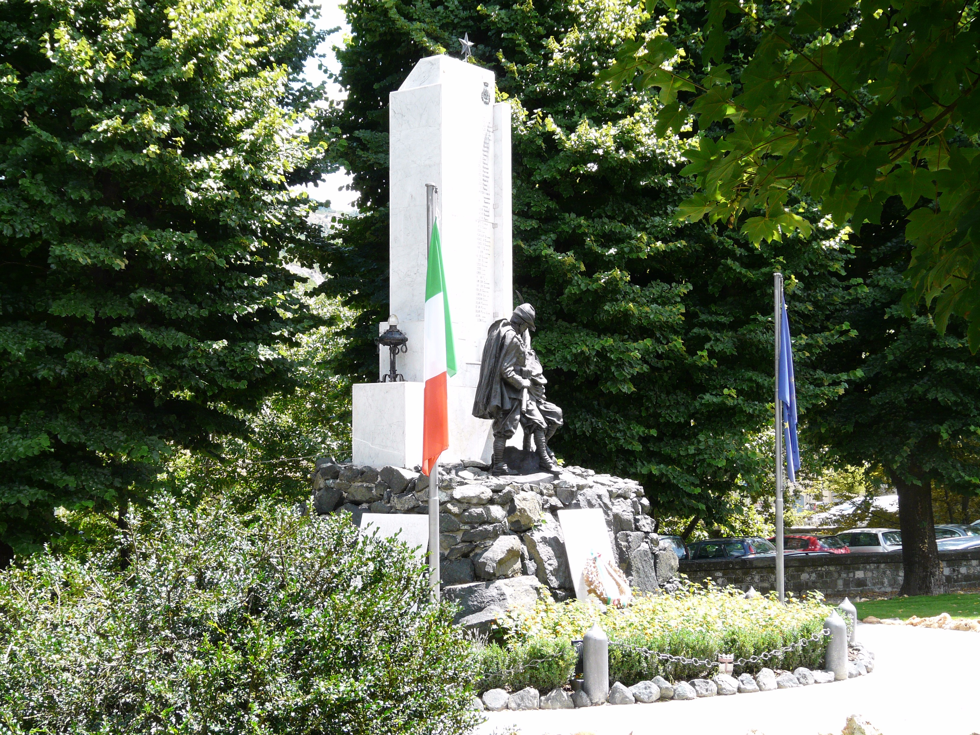 Monumento ai caduti di Bobbio, Emilia-Romagna, Italia